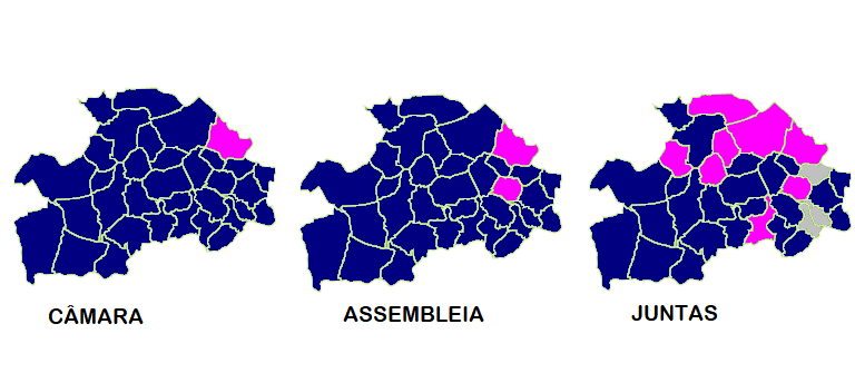 Mapa ilustrativo do partido mais votado por Freguesia